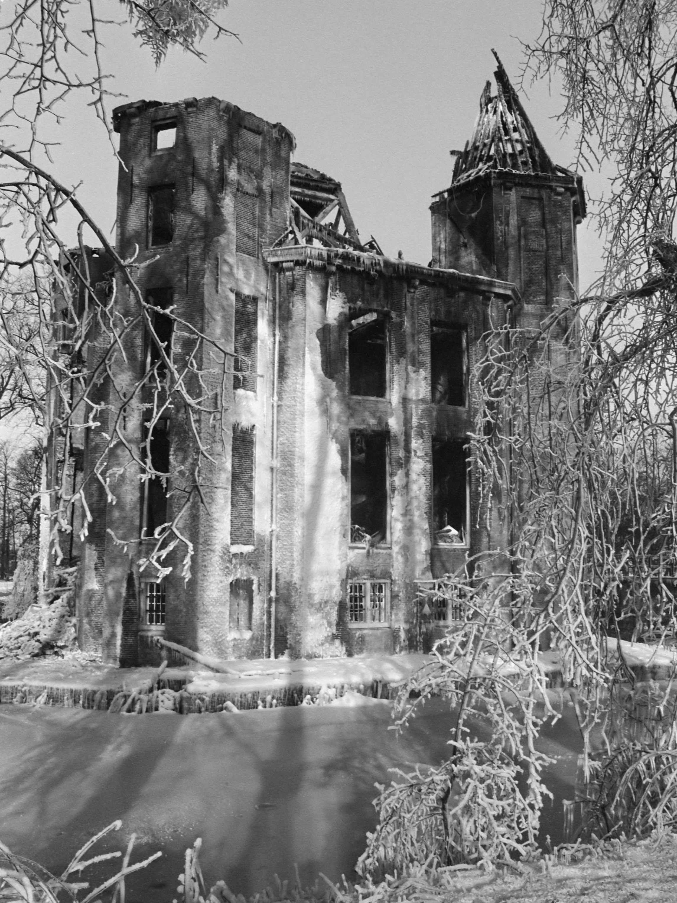 17e Eeuws Kasteel Heemstede te Houten gisteren uitgebrand 11 januari 1987